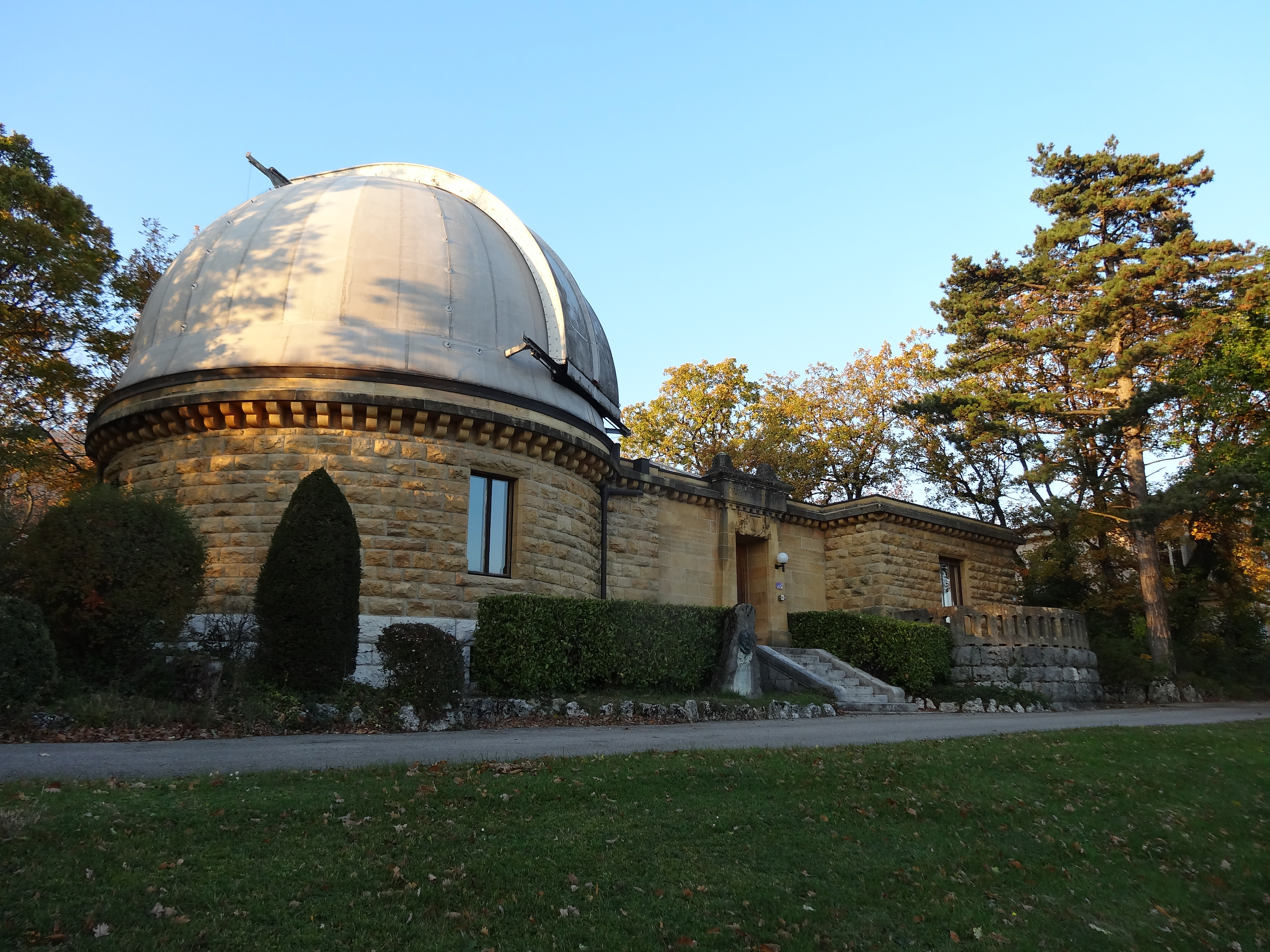 Le Pavillon Hirsch a été érigé conformément aux dispositions testamentaires du Dr. Adolphe Hirsch, premier directeur de l'Observatoire. Il a été inauguré le 6 juillet 1912.